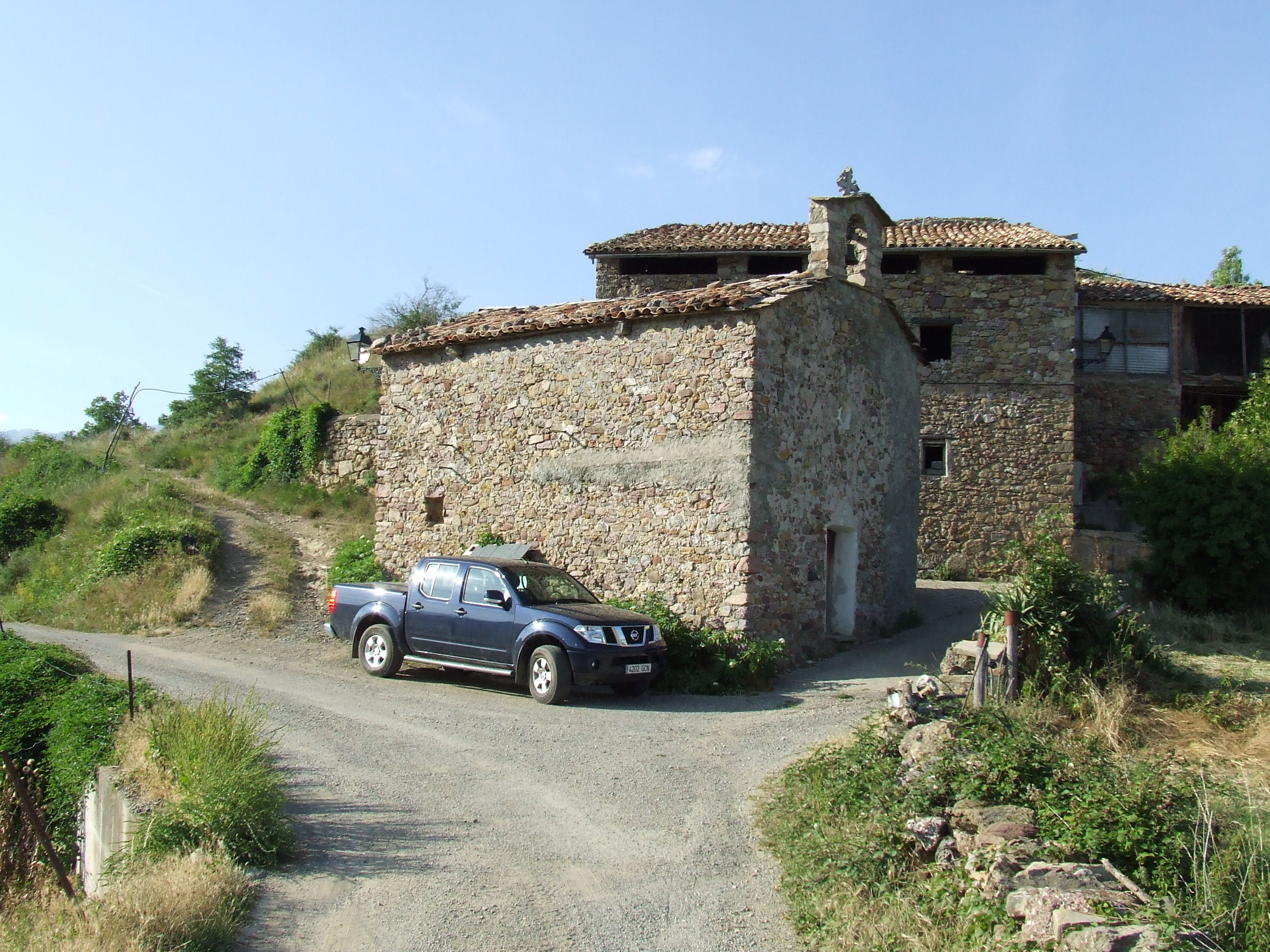 L'església de Burguet (Senterada, Pallars Jussà)